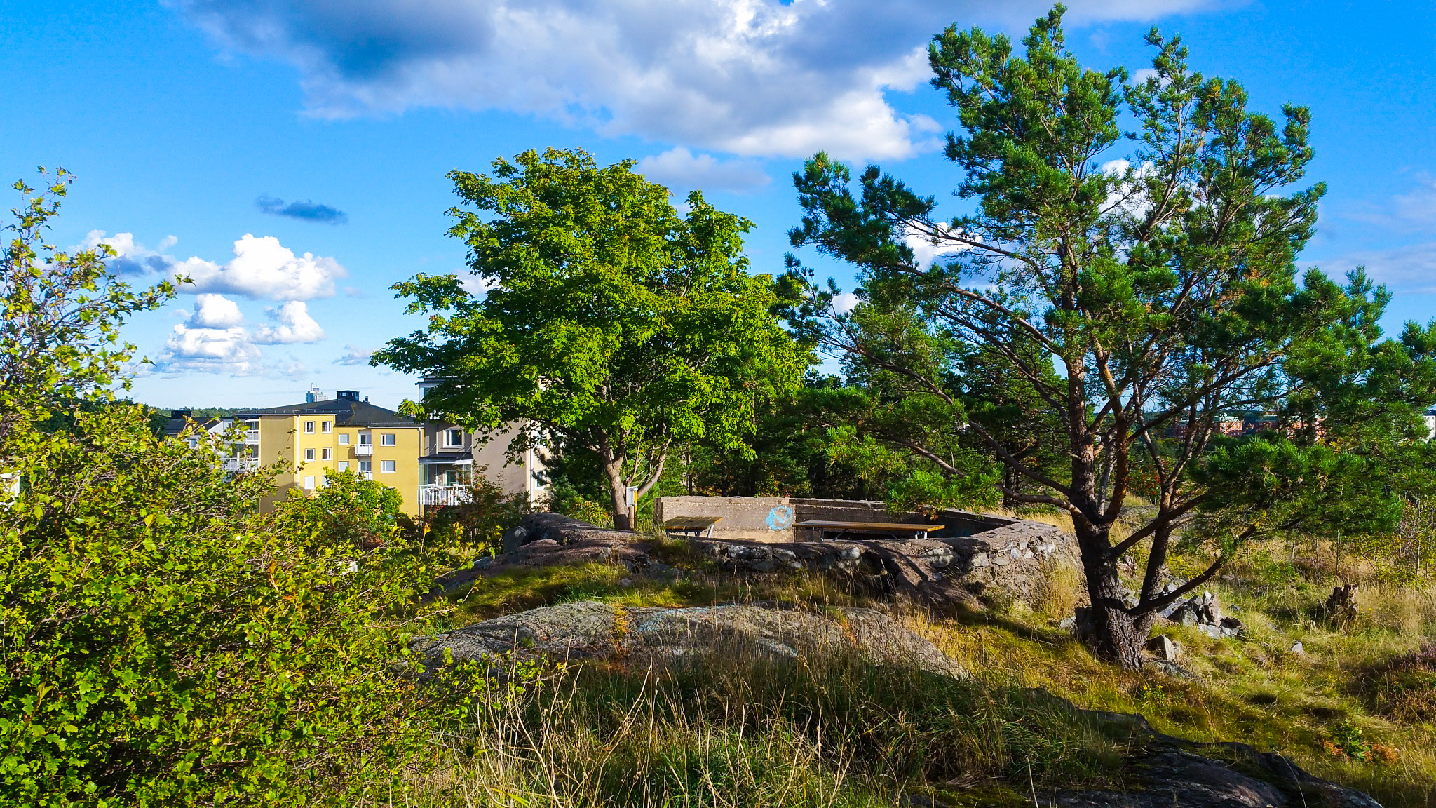 Tidigare luftvärnet på Skatberget som uppfördes under beredskapsåren och som används idag som grillplats